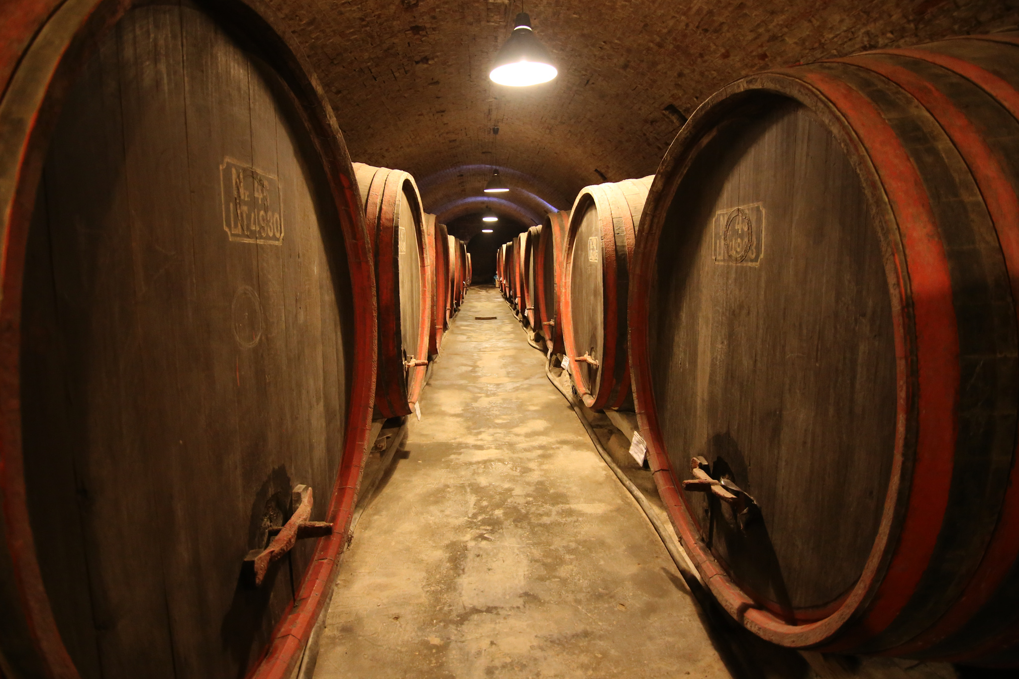 Cramă Conac Hagianoff din Manasia 02